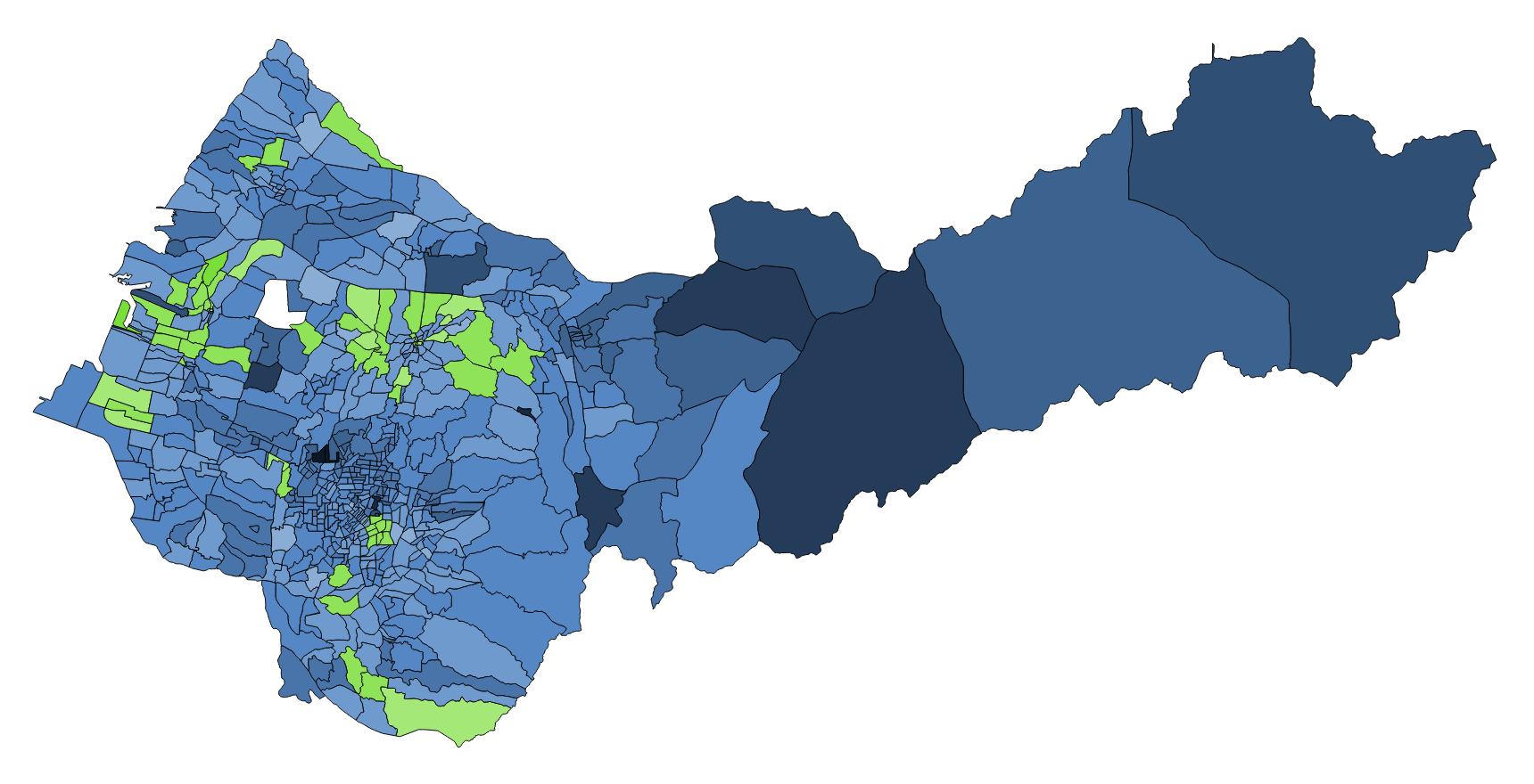 2018 台中市市長選舉各里得票